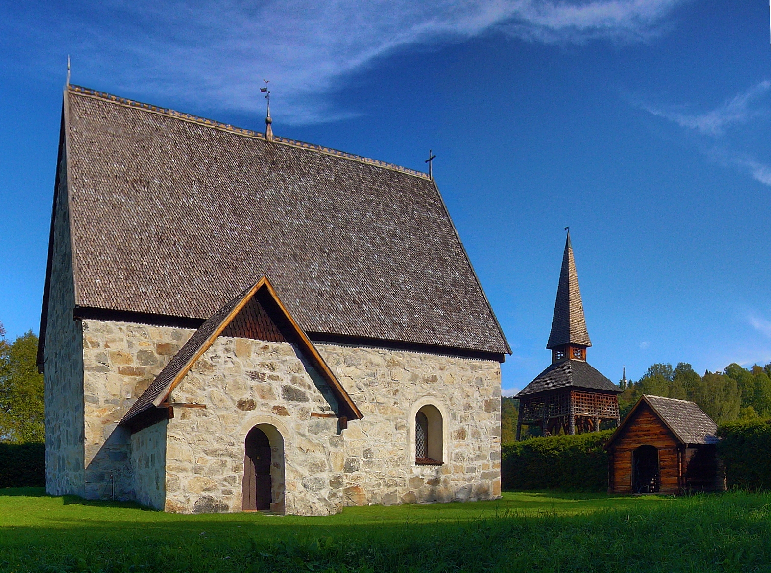 Lidens gamla kyrka med klockstapel och stegport. Till höger om klockstapeln skymtar nya kyrkans torn ovan trädtopparna.